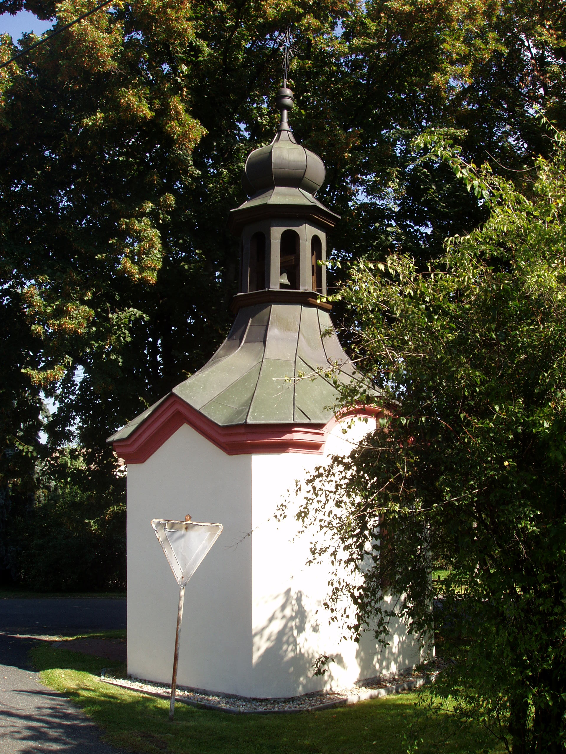 Kaplička sv. Jana Nepomuckého (Lošánky), náves, Lošánky